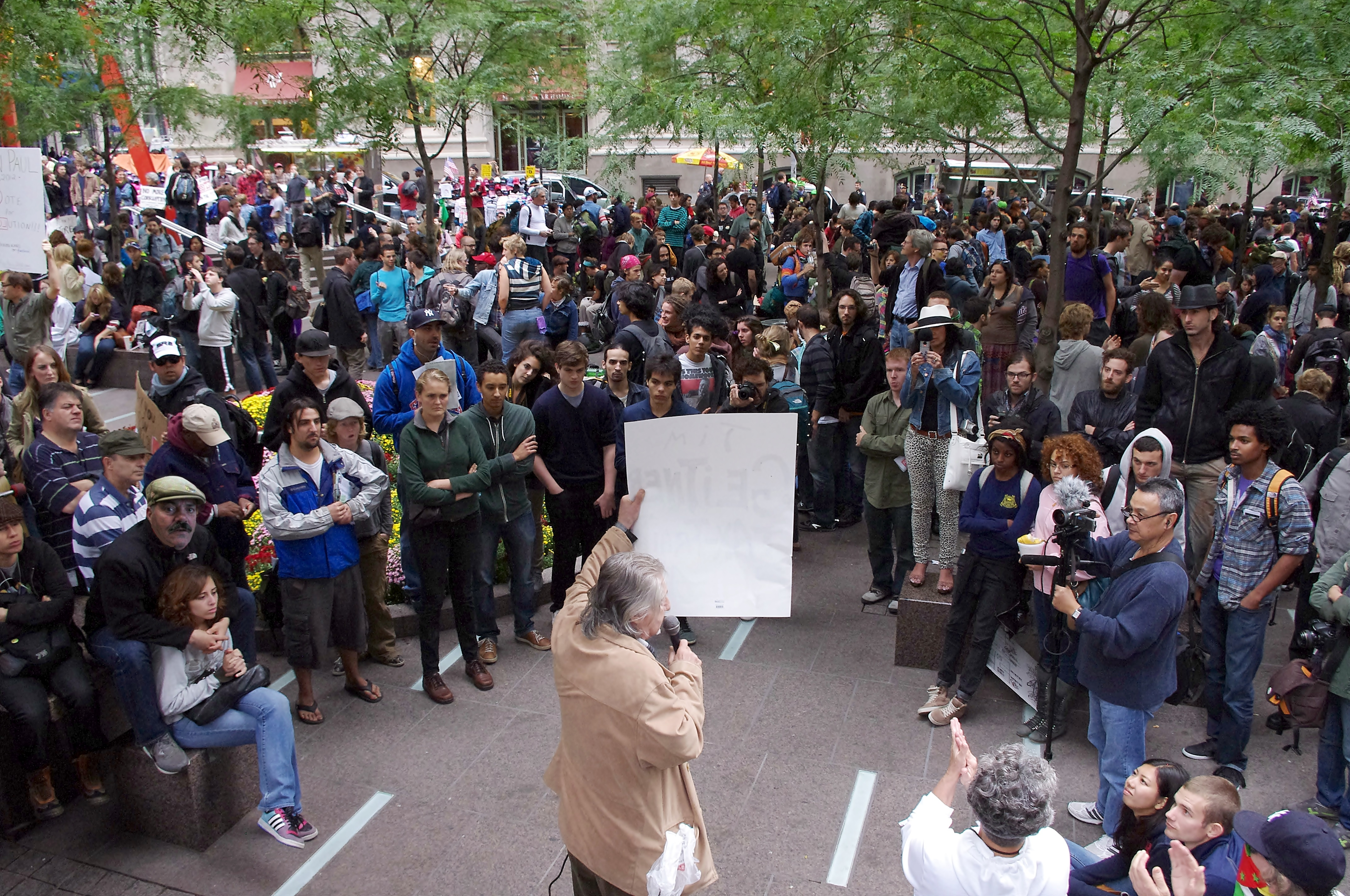 Une foule, un orateur, une pancarte.